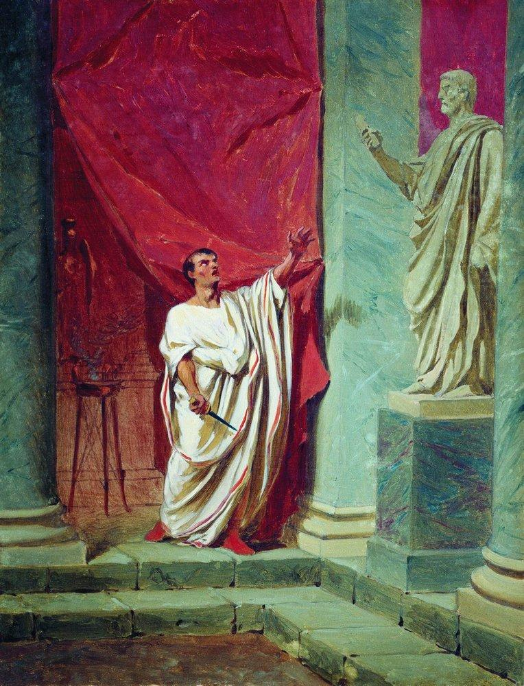 Клятва Брута перед статуей